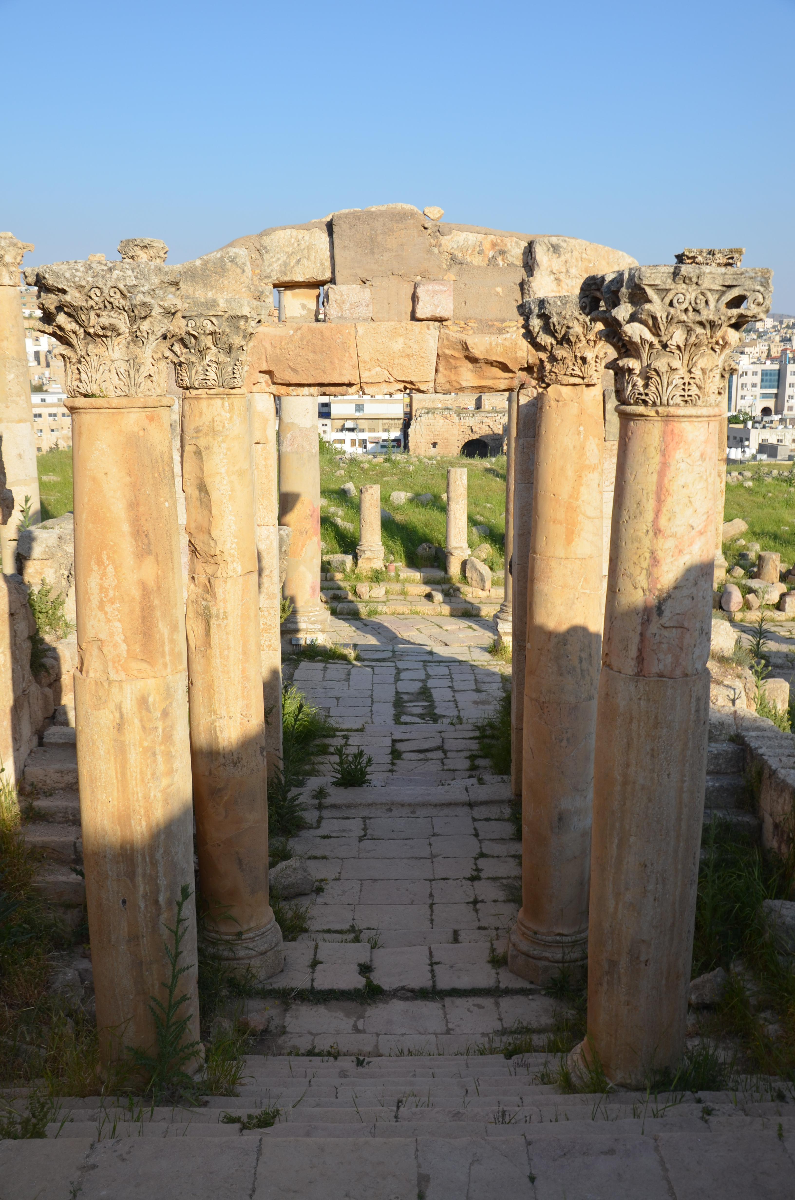 Gerasa, Jordan